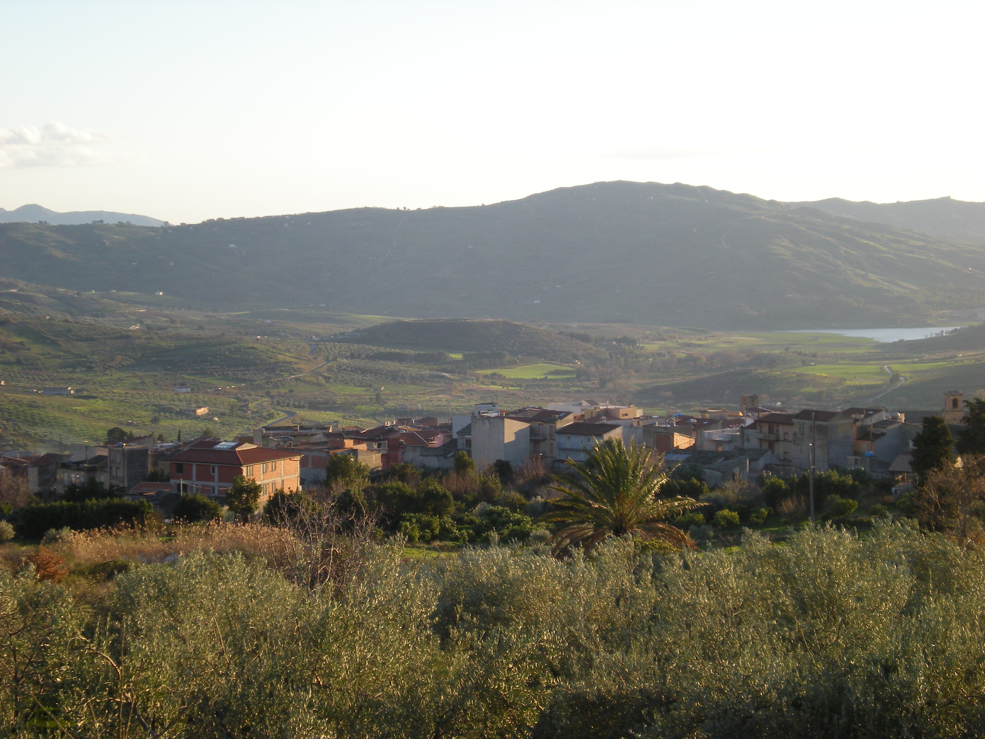 Panorama di Bivona